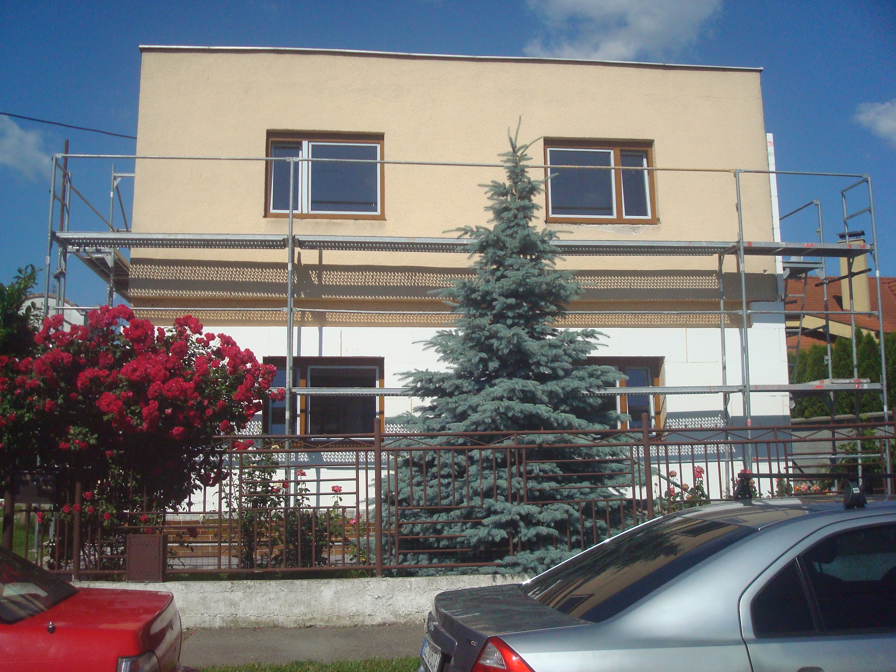 Varínska street, Prievoz, Ružinov, Bratislava, Slovakia